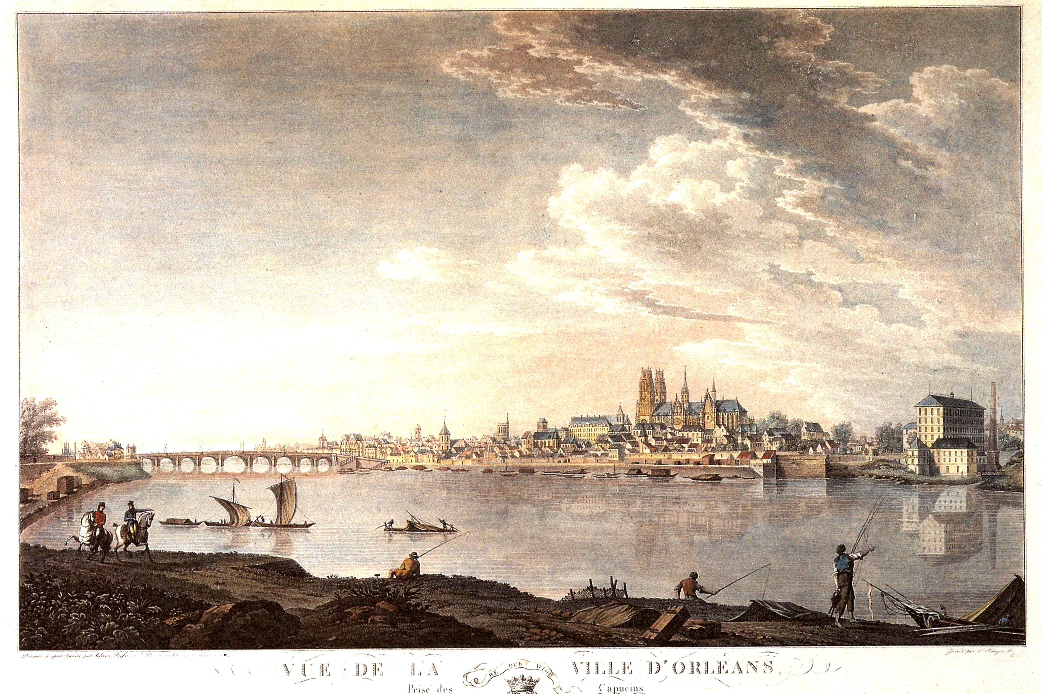 Pont Royal, Vue de la ville d’Orléans prise du quai des Capucins, Orléans, Loiret, France